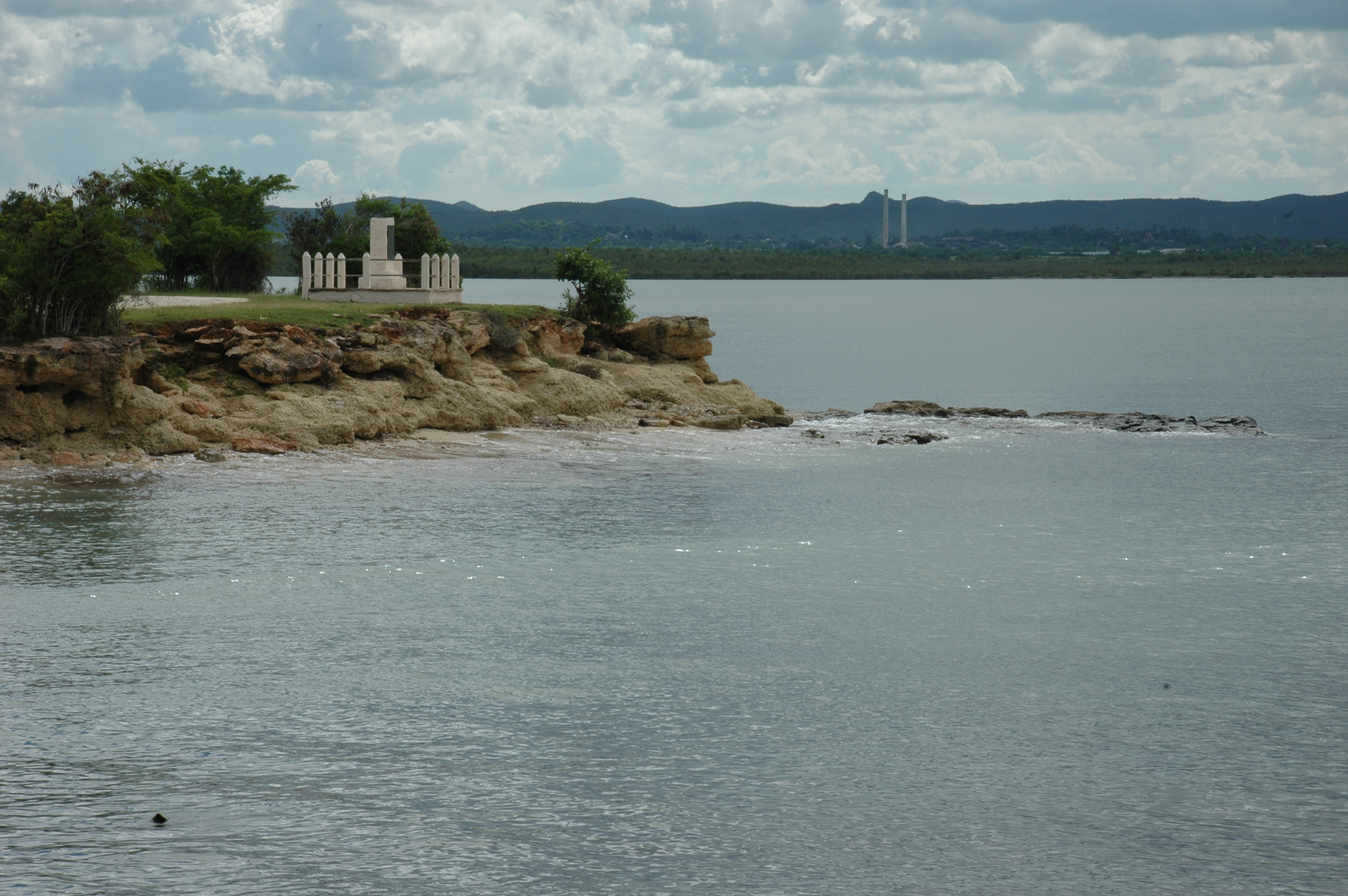 Puerto natural donde se encuentra enclavado el monumento a Cristobal Colon. Sitio ubicado por el grupo Humbolt basado en los apuntes de la bitacora del almirante.